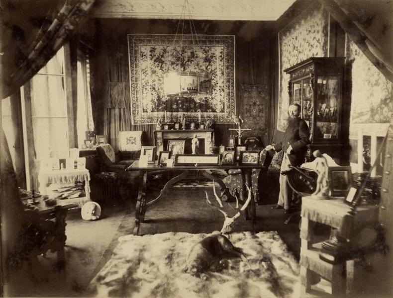 Le marquis François de Ripert-Monclar (1844-1921) dans un salon. Epreuve sur papier albuminé contrecollée sur carton. Une couche de gélatine glacée à chaud recouvre le carton et l'épreuve.